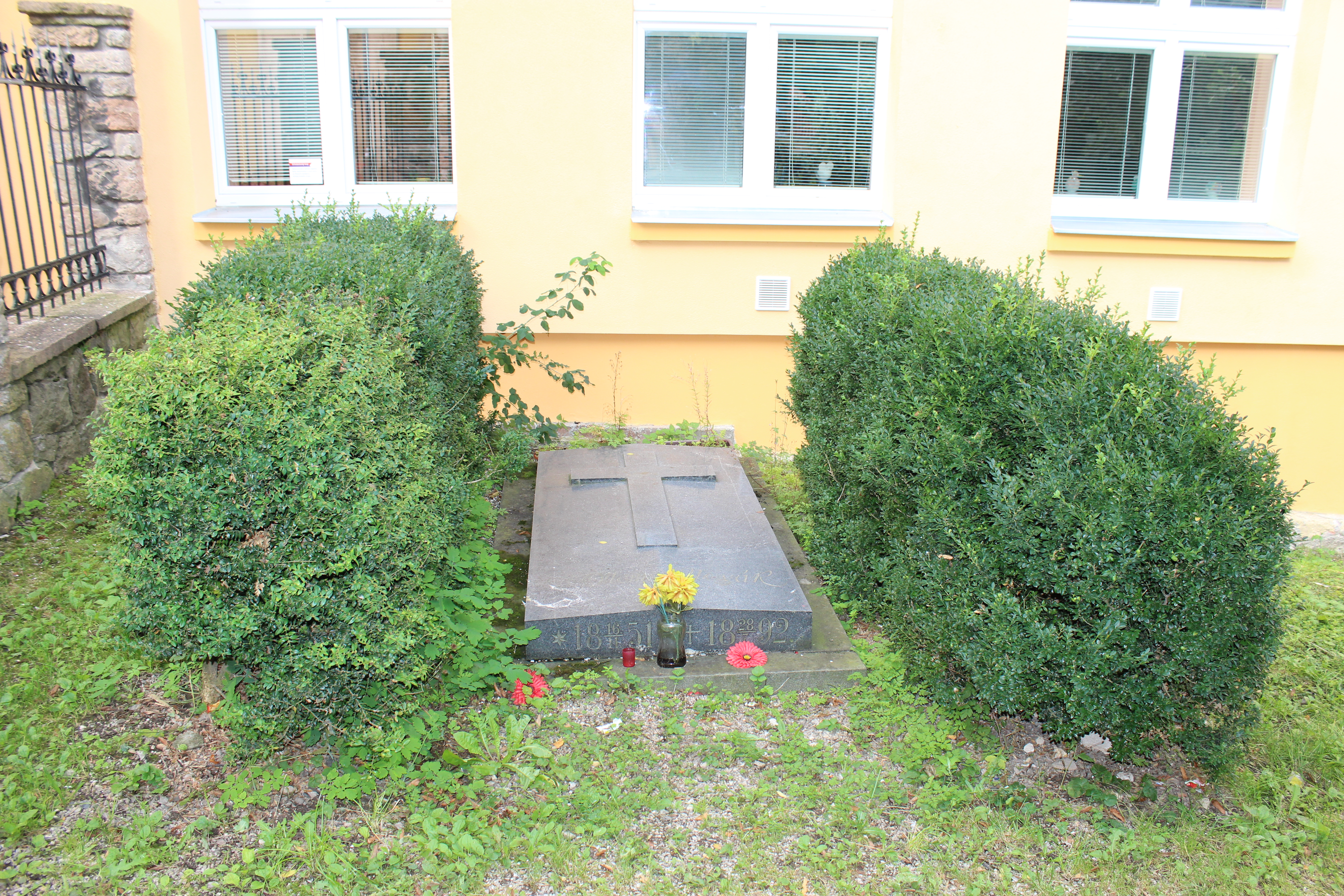 U zdi ZŠ Liteň je pohřben Otomar Pravoslav Novák (1851 – 1892), český paleontolog a žák J. Barranda